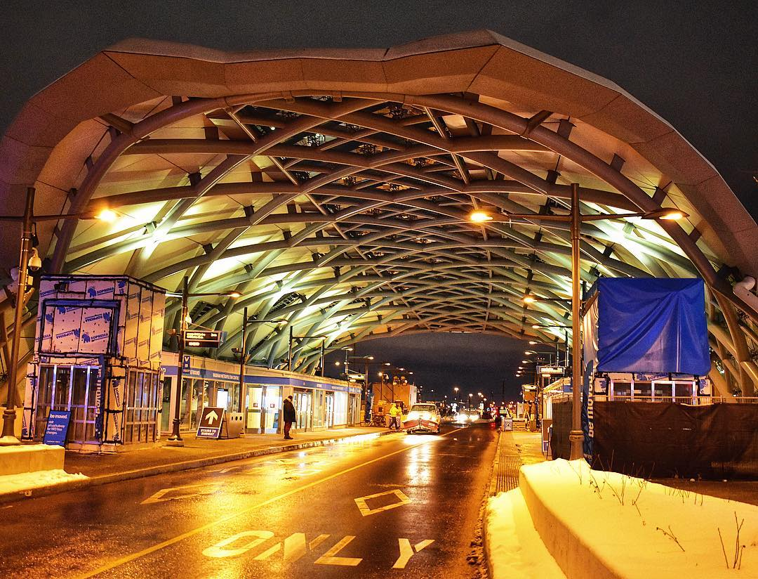 via Instagram ift.tt/2BELRjy